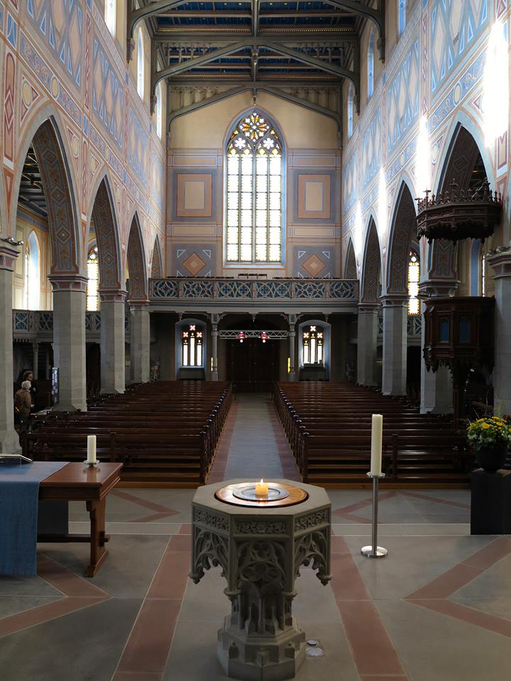 Mittelschiff; Bild: A.F.